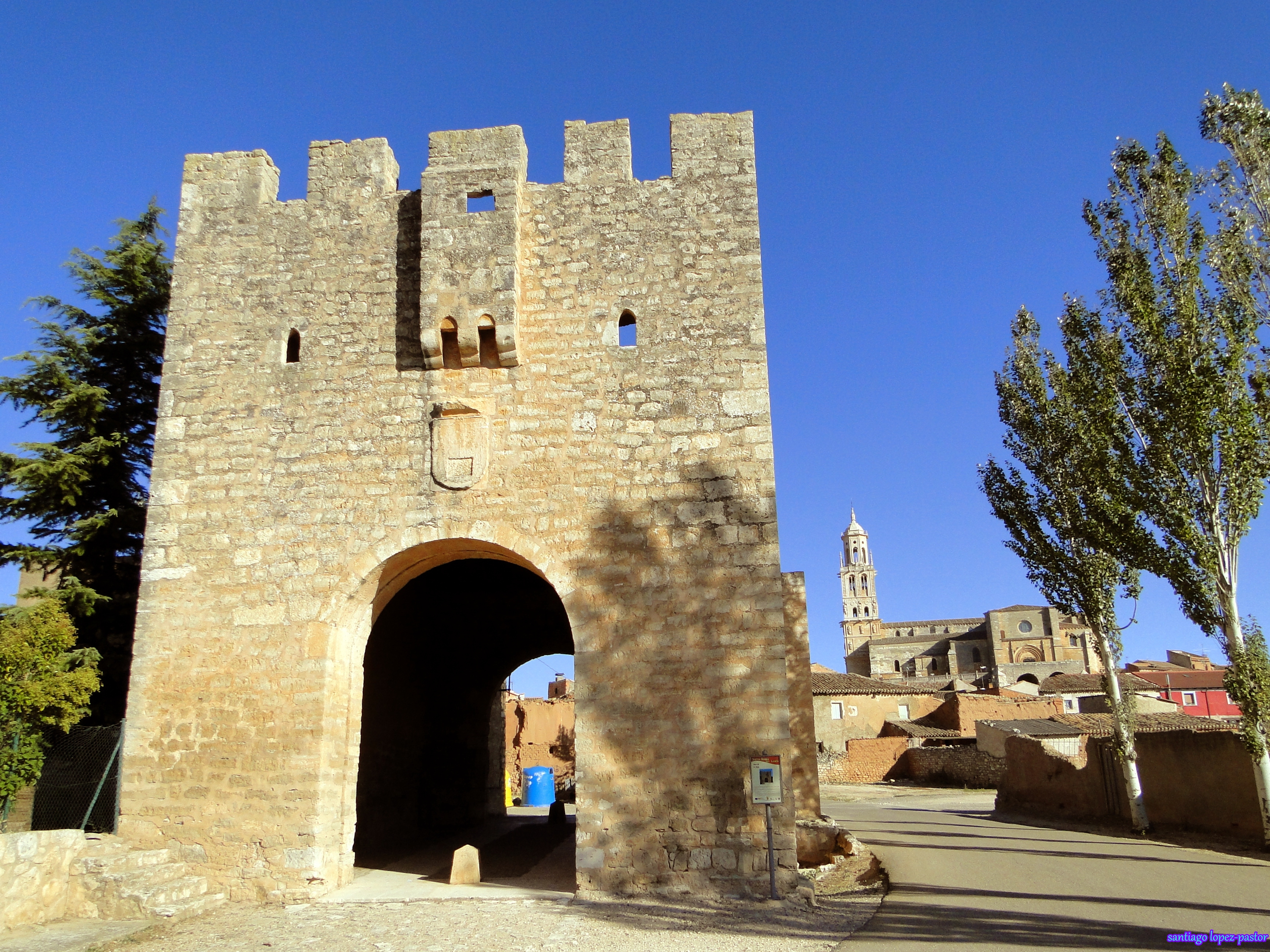 Arco de la Vega.